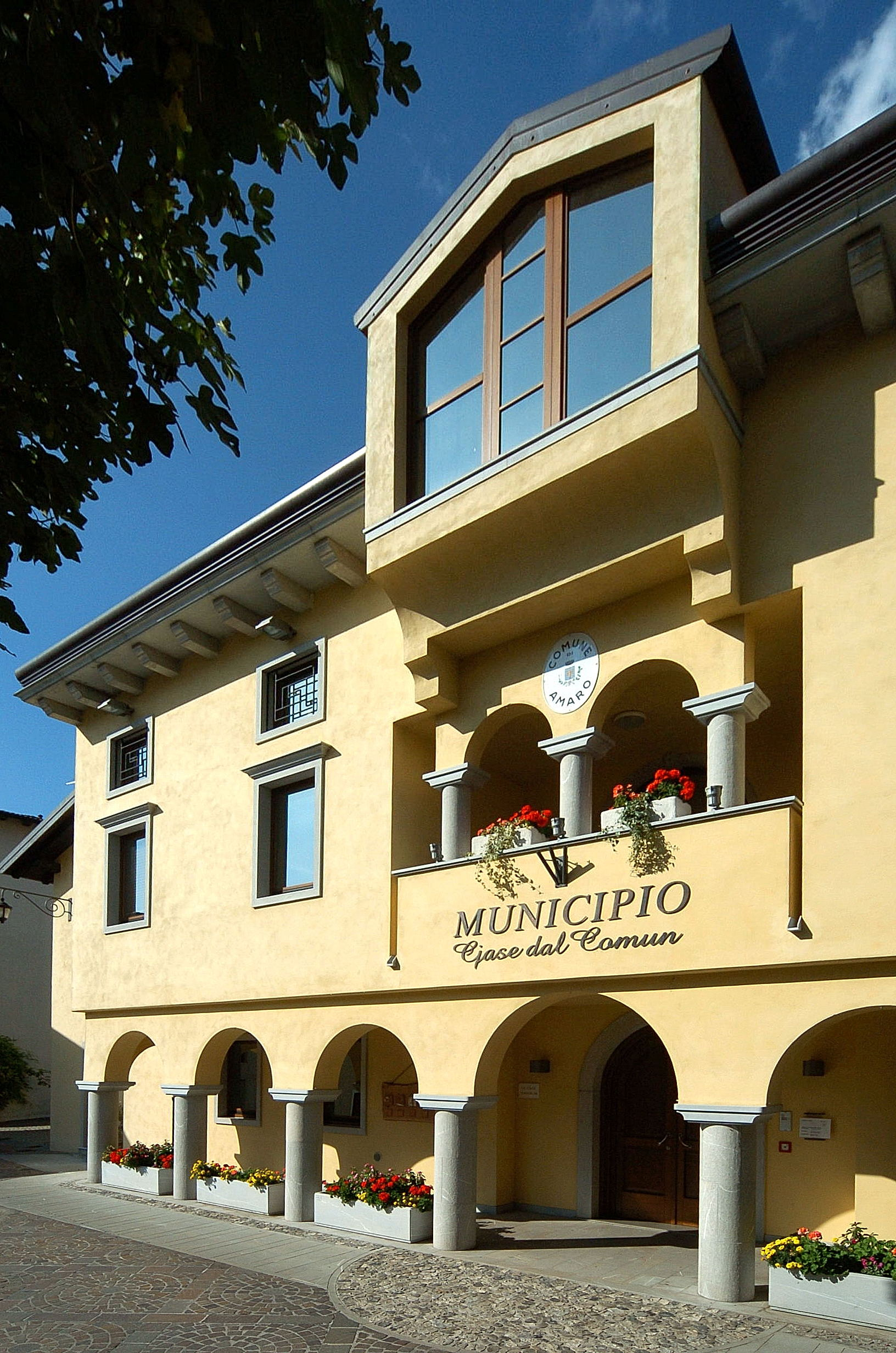 Municipal office in the community Amaro, region Friuli Venezia-Giulia, Italy